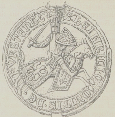 Siegel des Grafen Heinrich II. von Fürstenberg